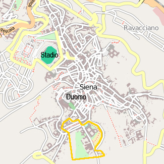 Mappa di Siena, con evidenziata la Contrada della Tartuca